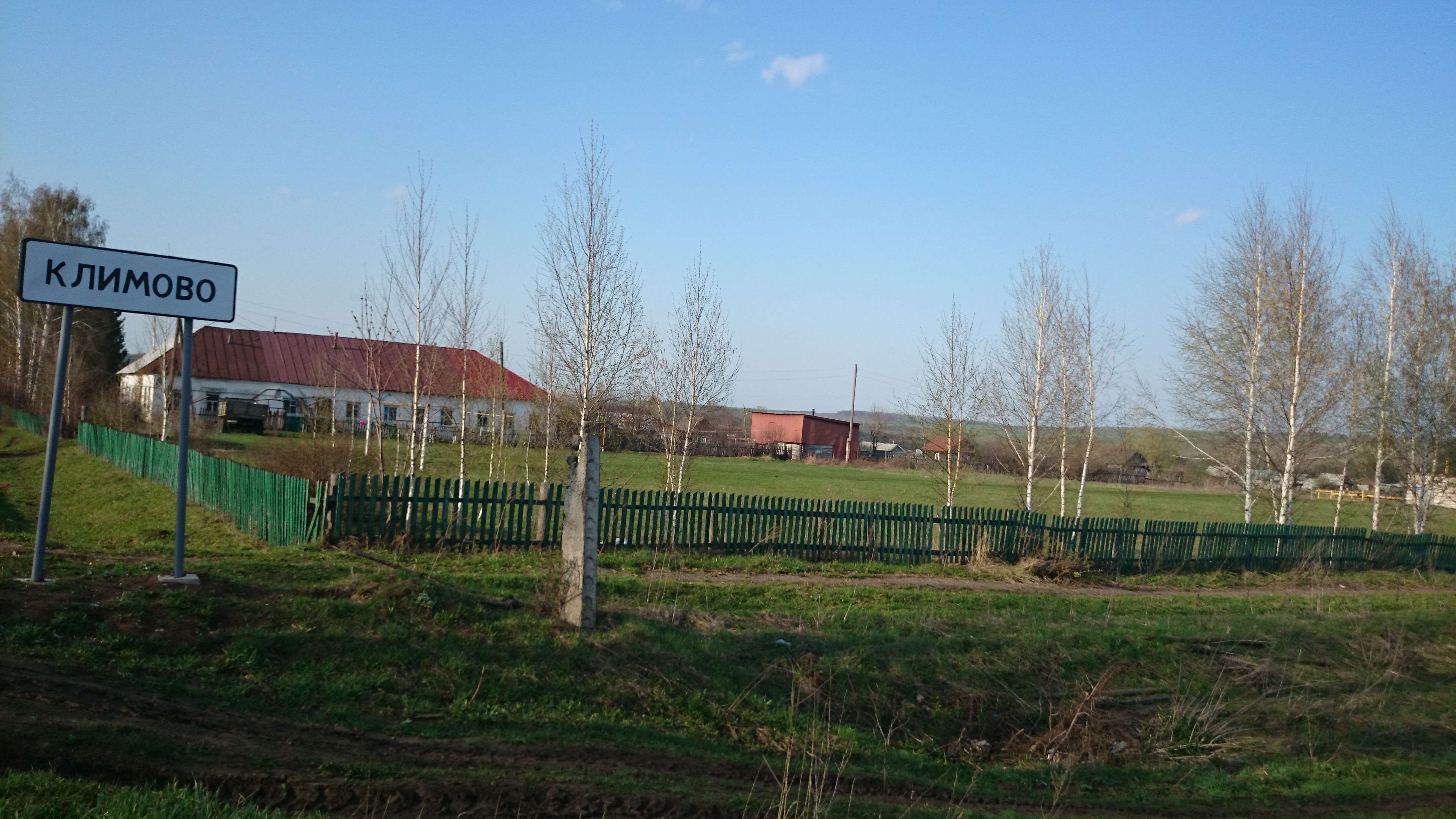 Климово 2 мая 2014